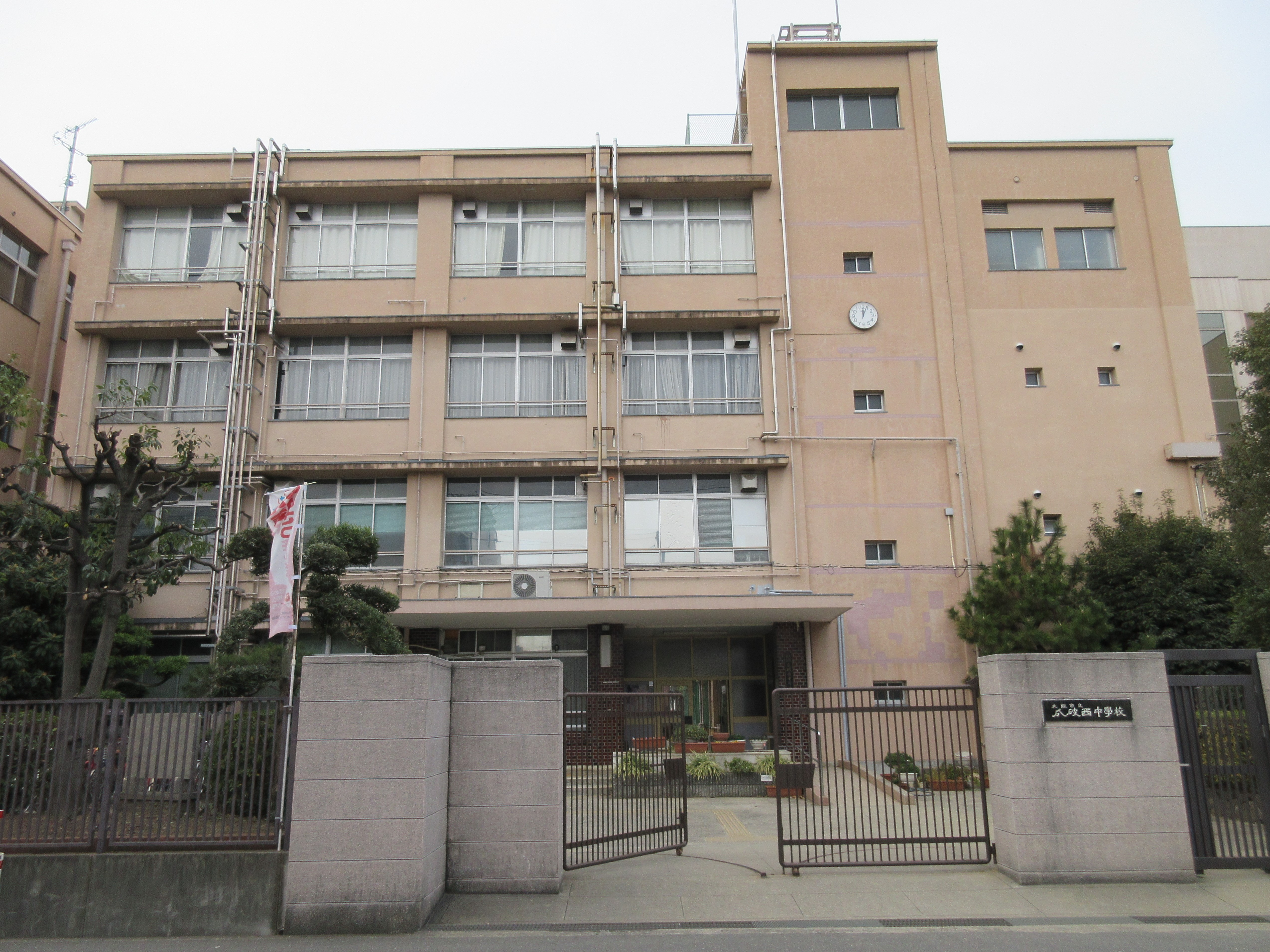 大阪市立瓜破西中学校